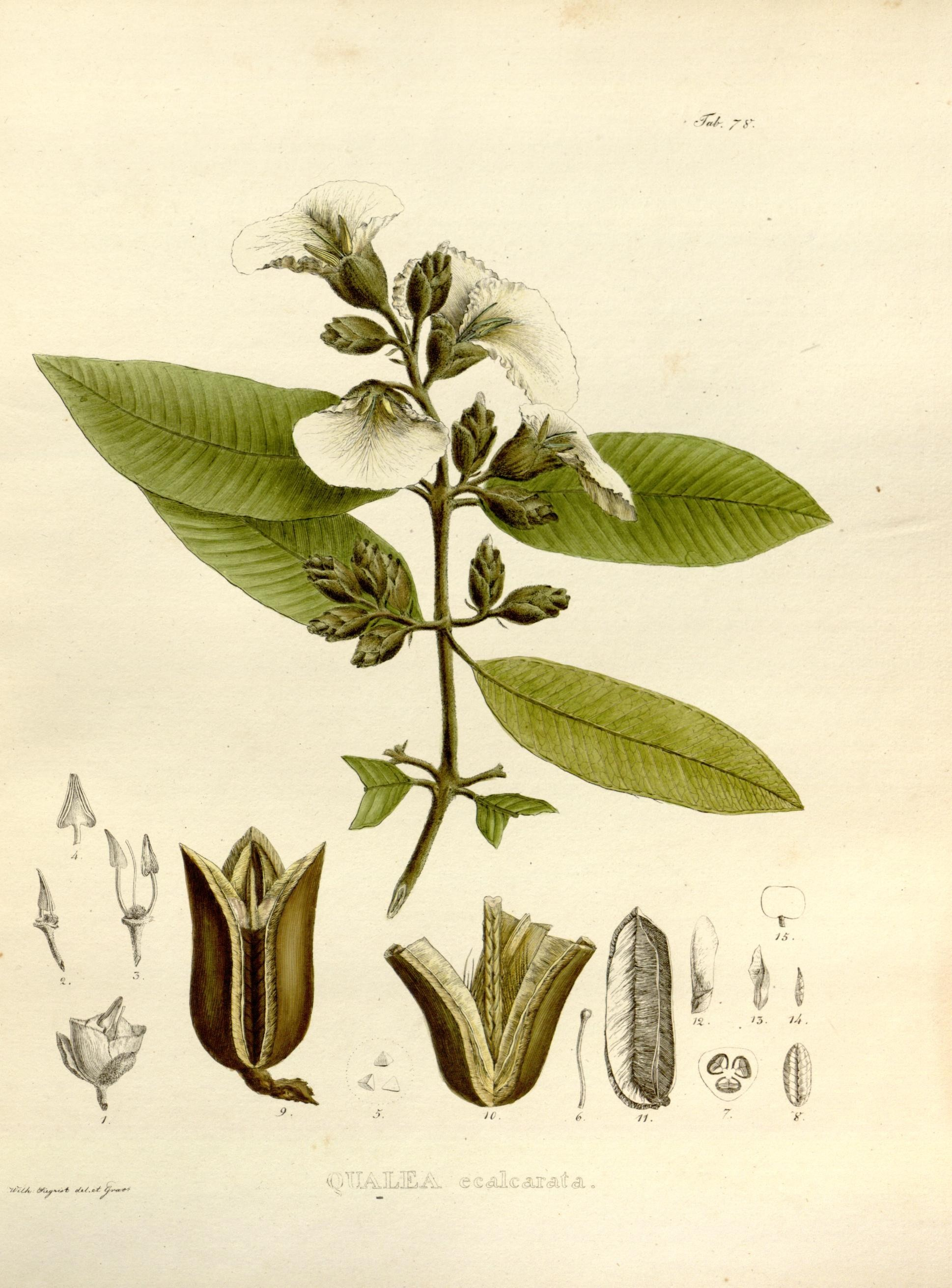 Qualea ecalcarata = Qualea grandiflora Nova genera et species plantarum. Monachii [Munich] :Impensis Auctoris,1824-1829 [i.e. 1824-32]..